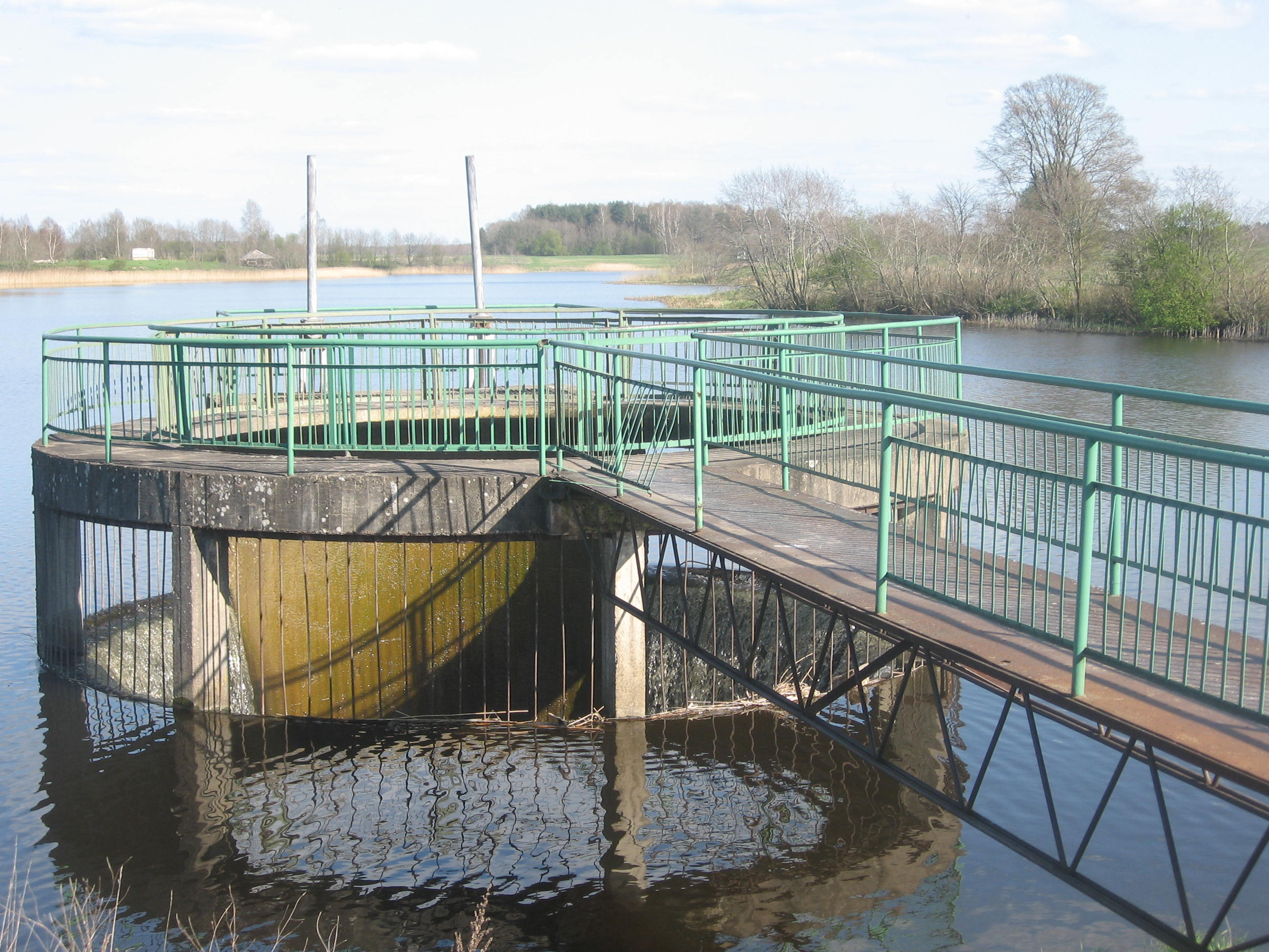 Užtvanka.